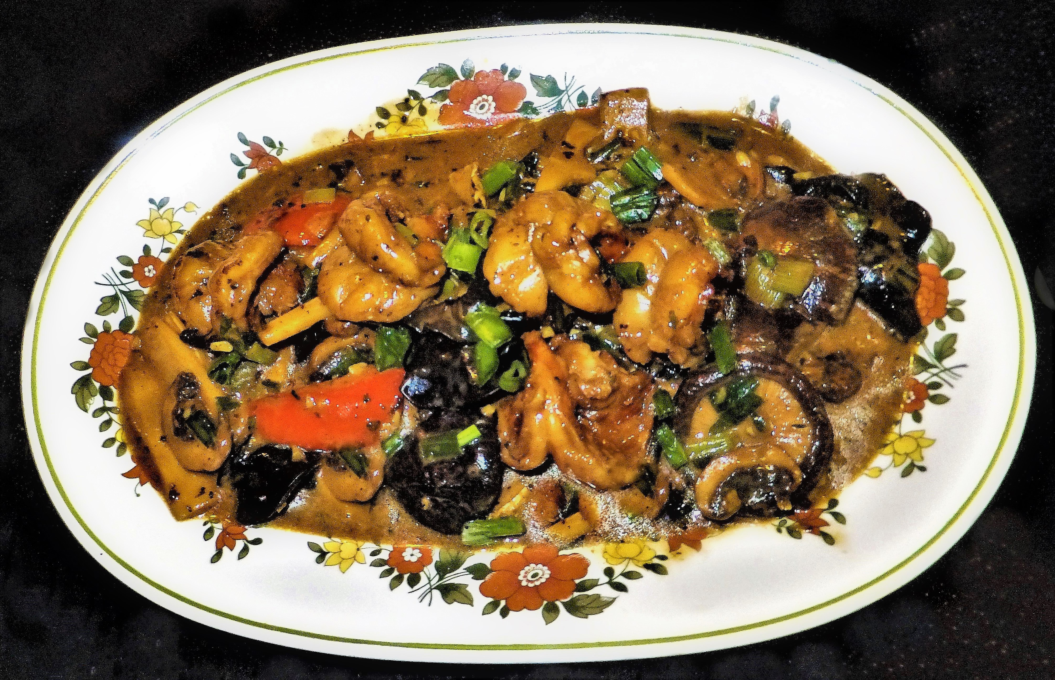 Chinesisches Gericht mit Kingprawns und Pilzen